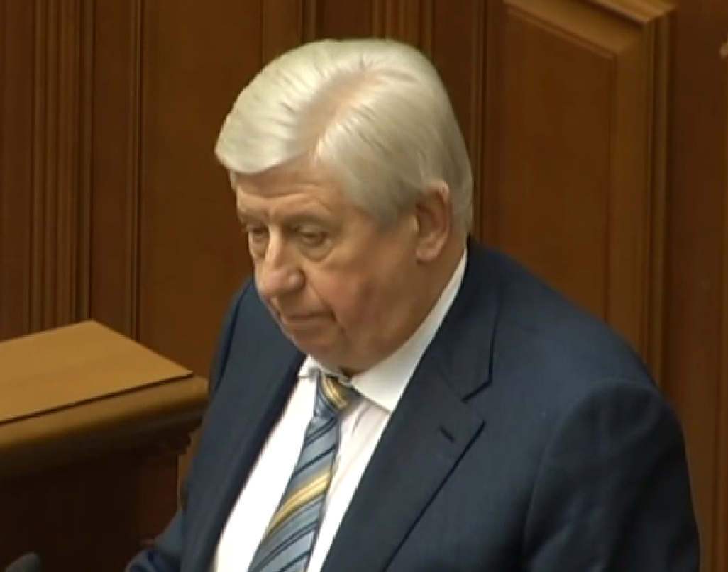 Шокін Віктор Миколайович — Генеральний прокурор України.